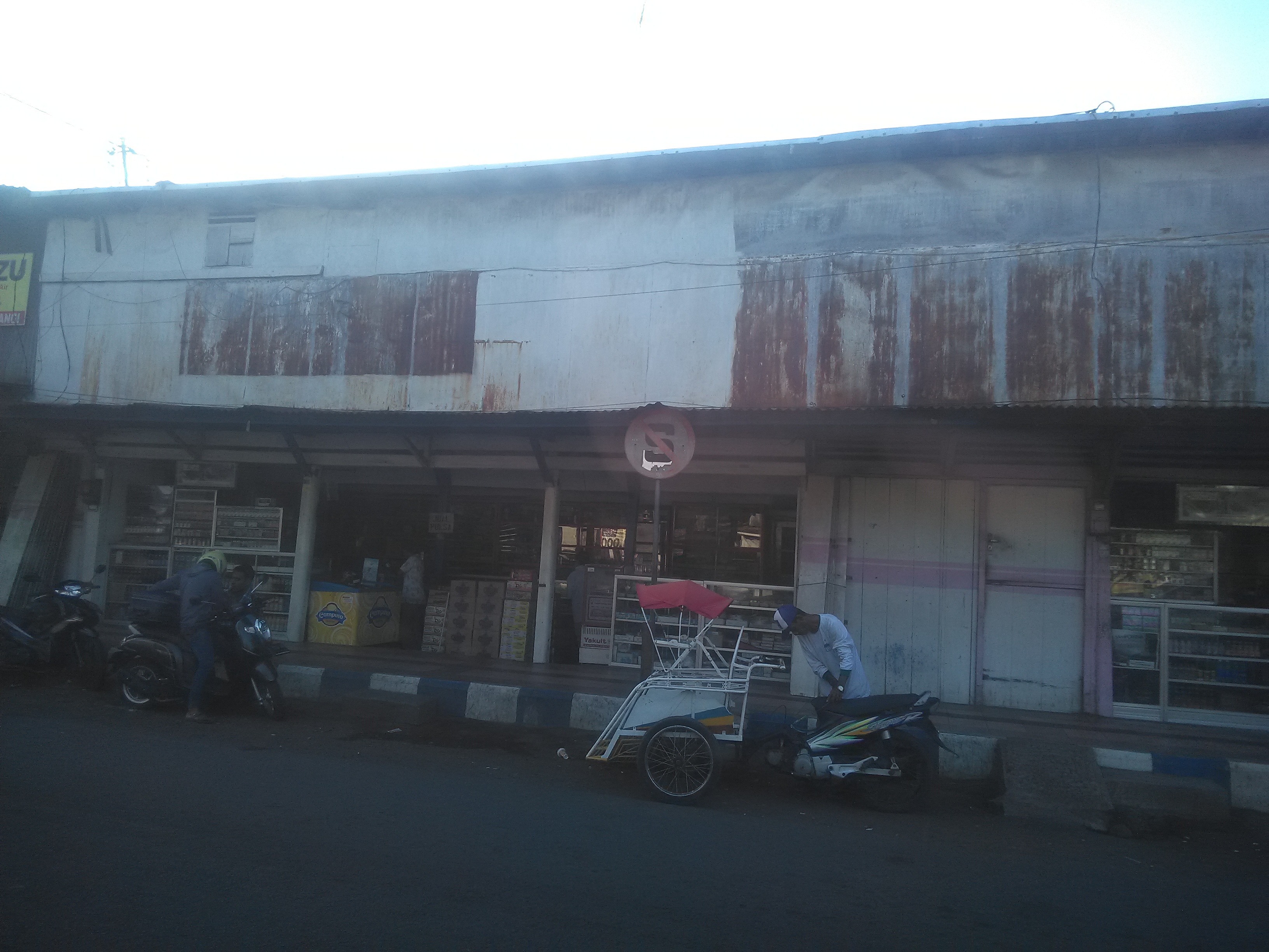 Kios Stasiun Srono